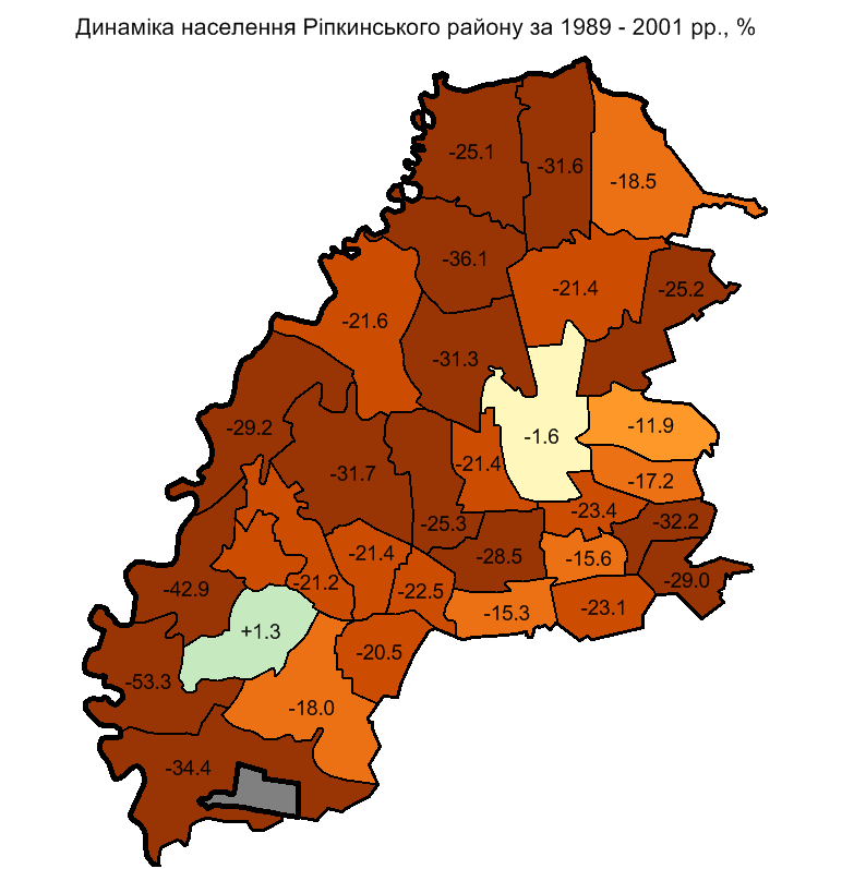 Динаміка населення Ріпкинського району за 1989 - 2001 рр. / Population dynamics of Ripky raion,1989-2001